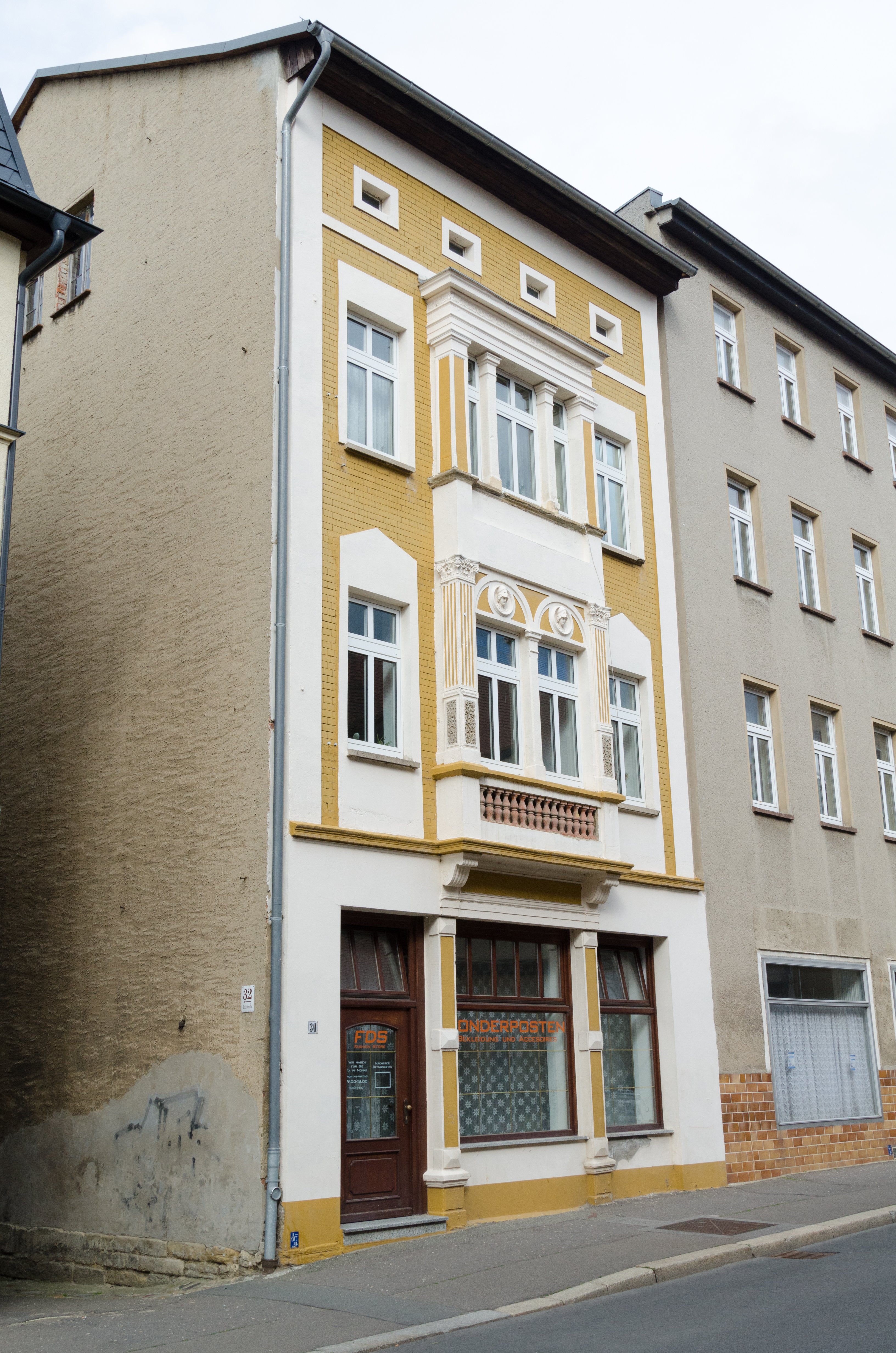 Zeitz, Kalkstraße 30